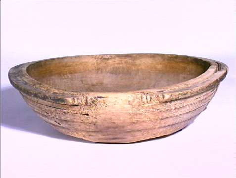 Vangar fra Bykle i Setesdal, trolig brukt til melk. Nå på Norsk Folkemuseum i Oslo. Diameter 40.cm. NF.1917-0578.